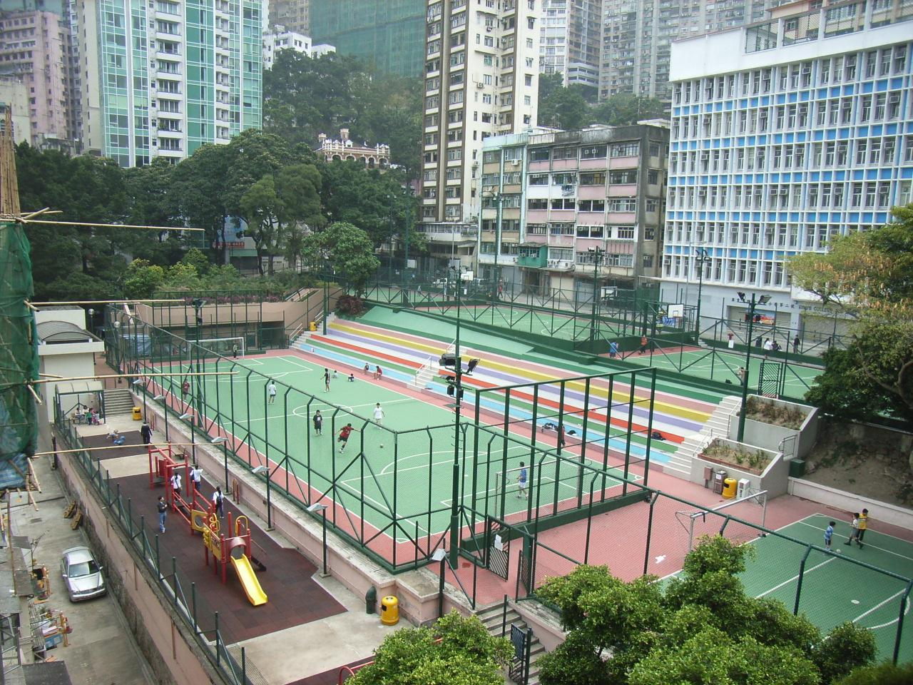 香港zh:上環zh:普仁坊zh:卜公花園, Sheung Wan, Hong Kong